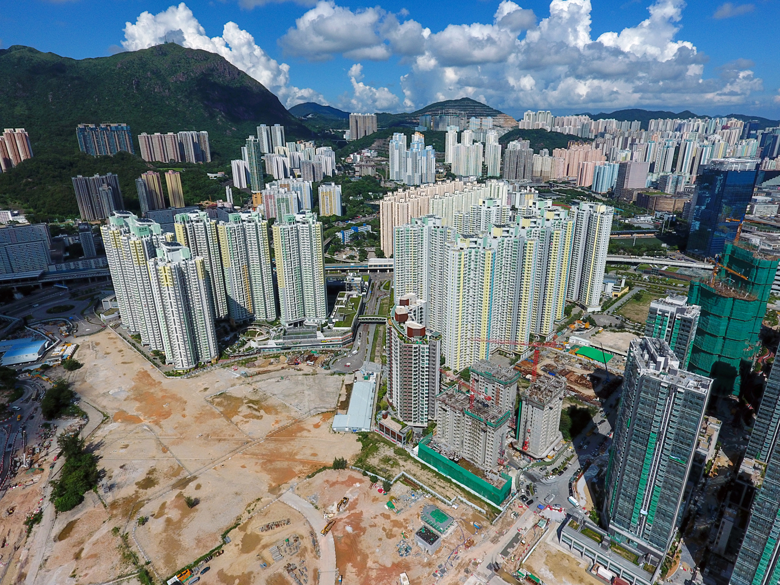 Kai Ching Estate and Tak Long Estate